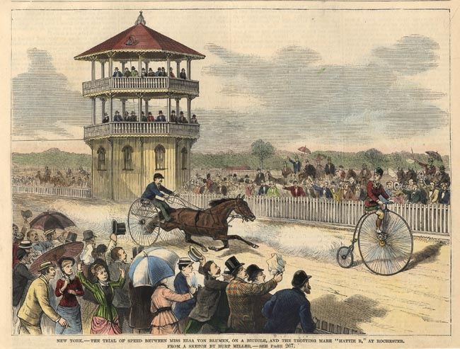 Elsa von Blumen, Rennen gegen das Pferd Hattie in Rochester